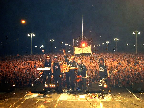 127 Aniversario de la ciudad de La Plata Argentina